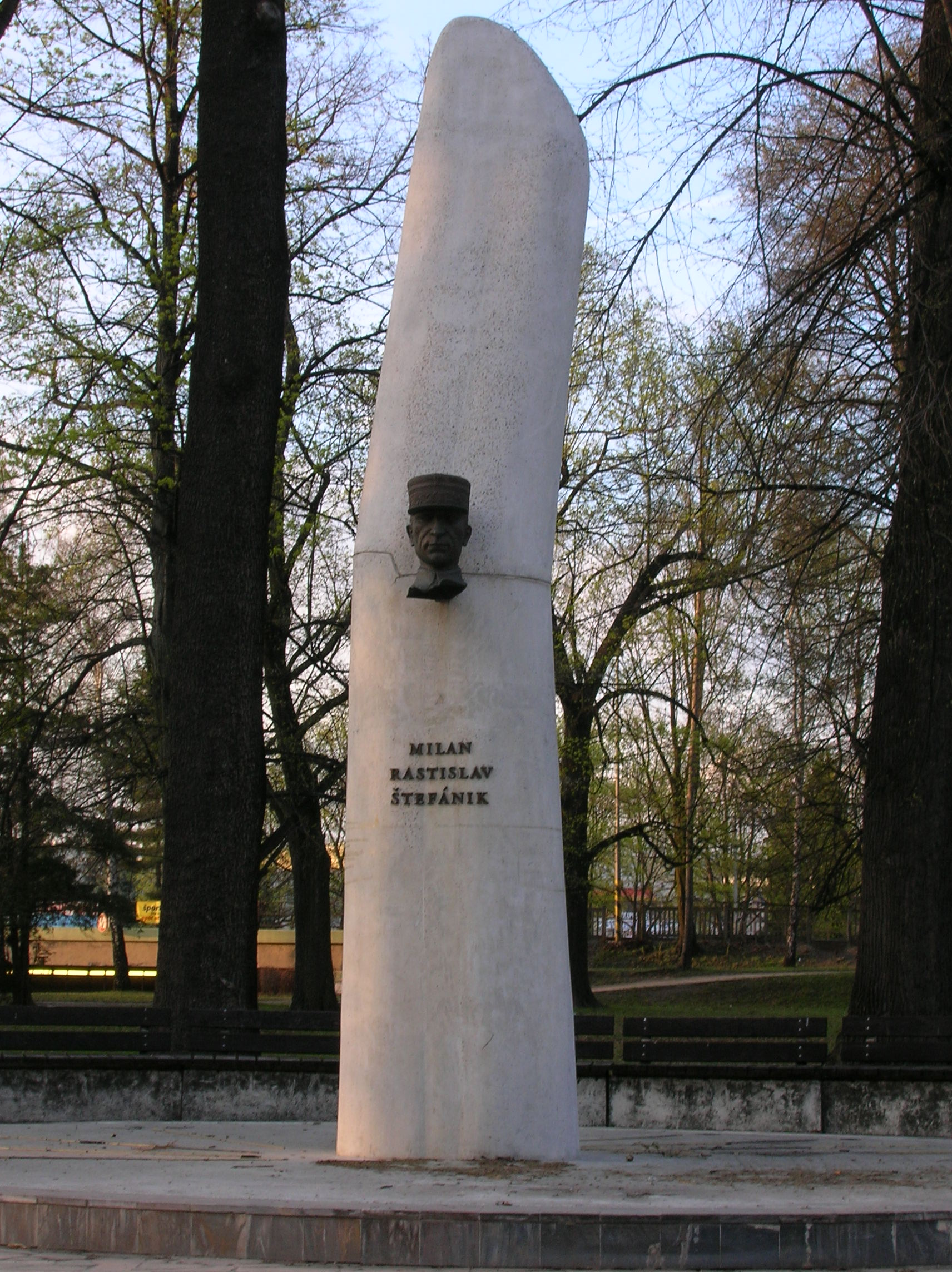 pamätník M.R.Štefánika, park gen. M. R. Štefánika, Trenčín